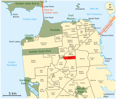 Situation du Castro, San Francisco, USA